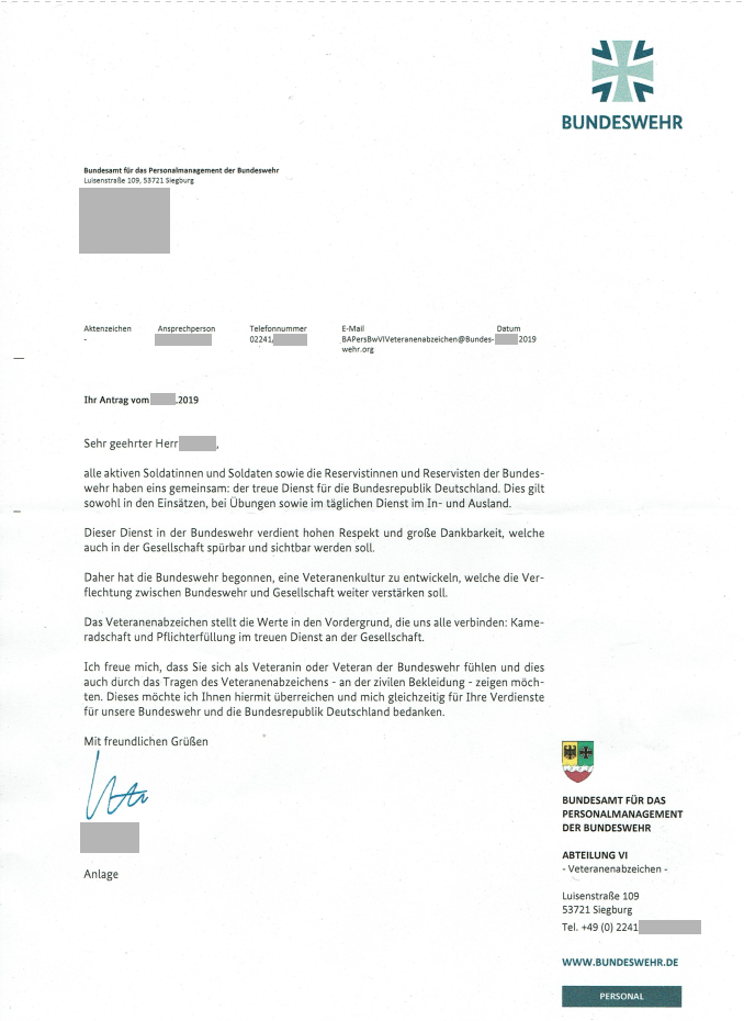 Anschreiben Veteranenabzeichen Anfang 2020